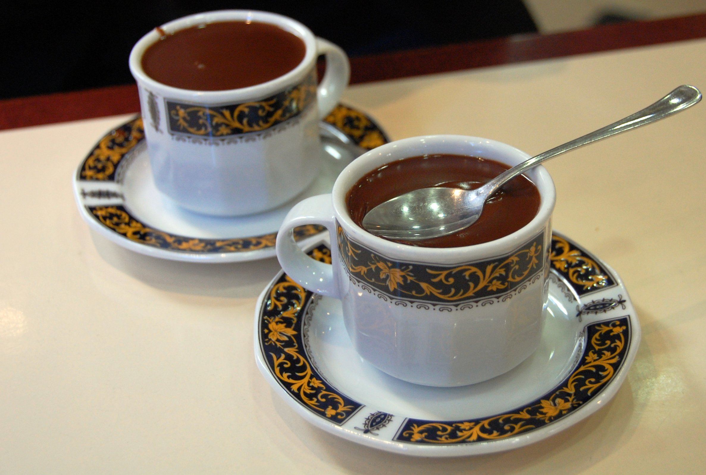 Dos tazas de espeso chocolate caliente, en Granada.